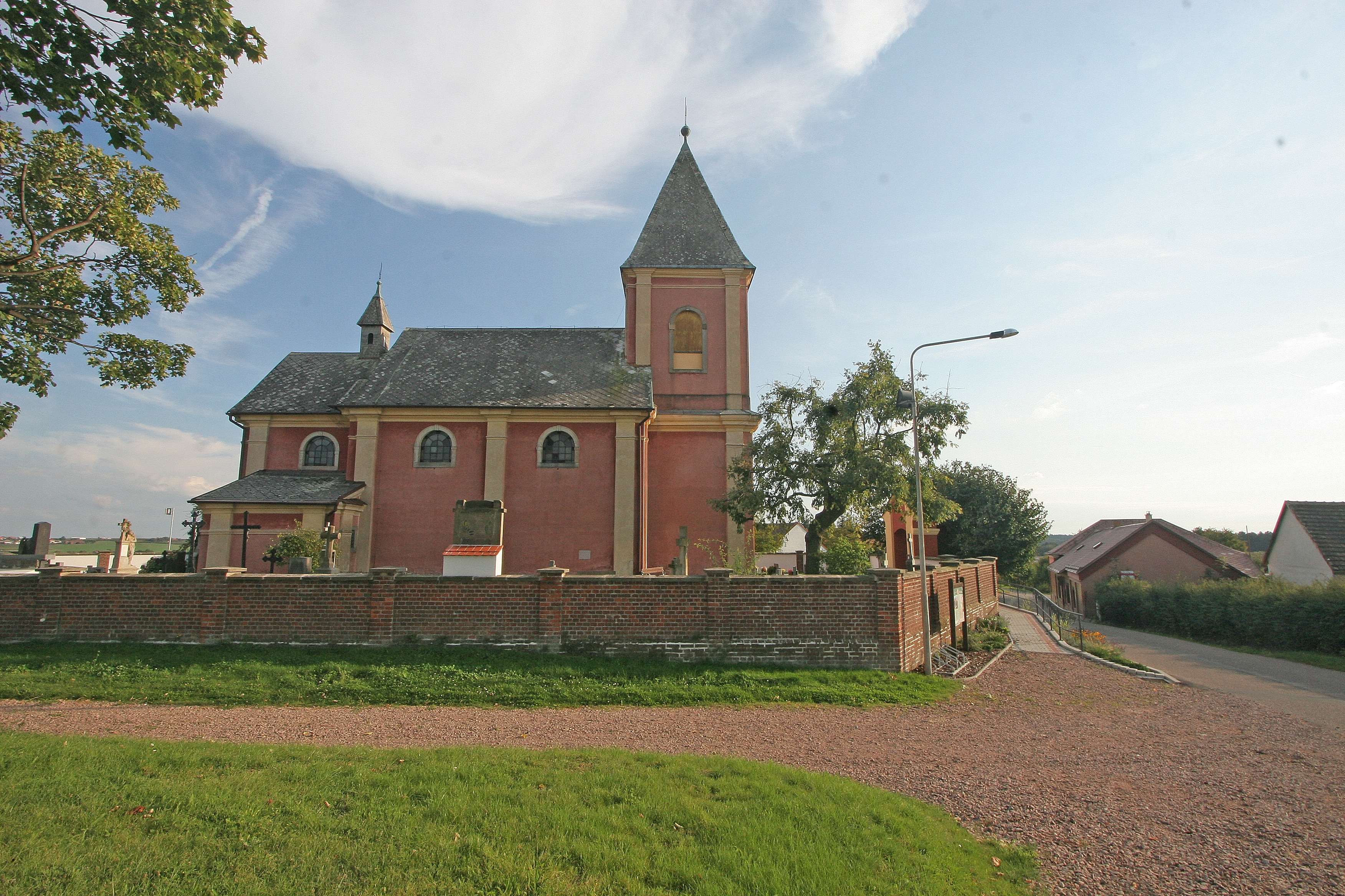 Kostel sv. Jiří (Hrádek), Hrádek